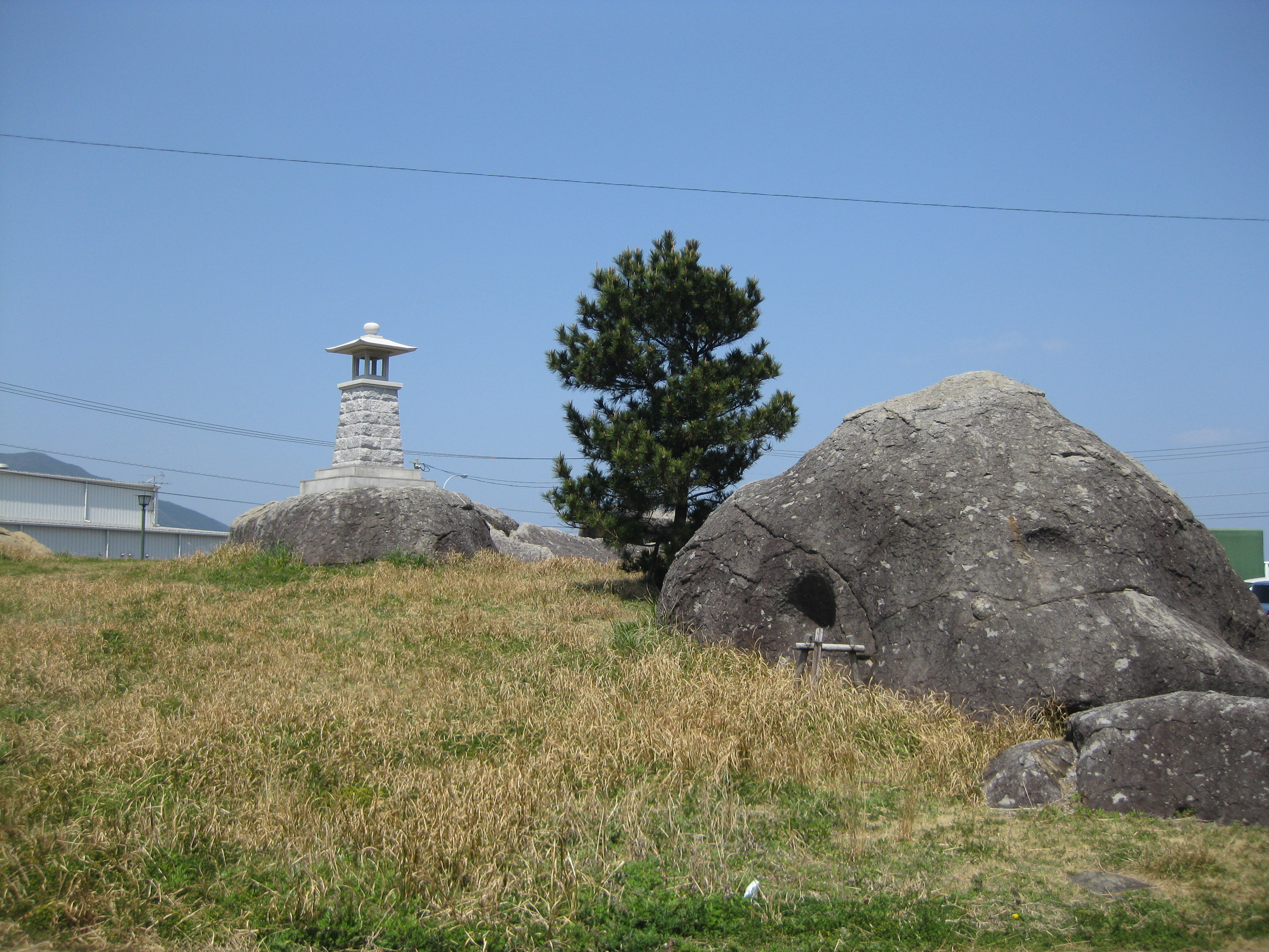 有川 陸瀬